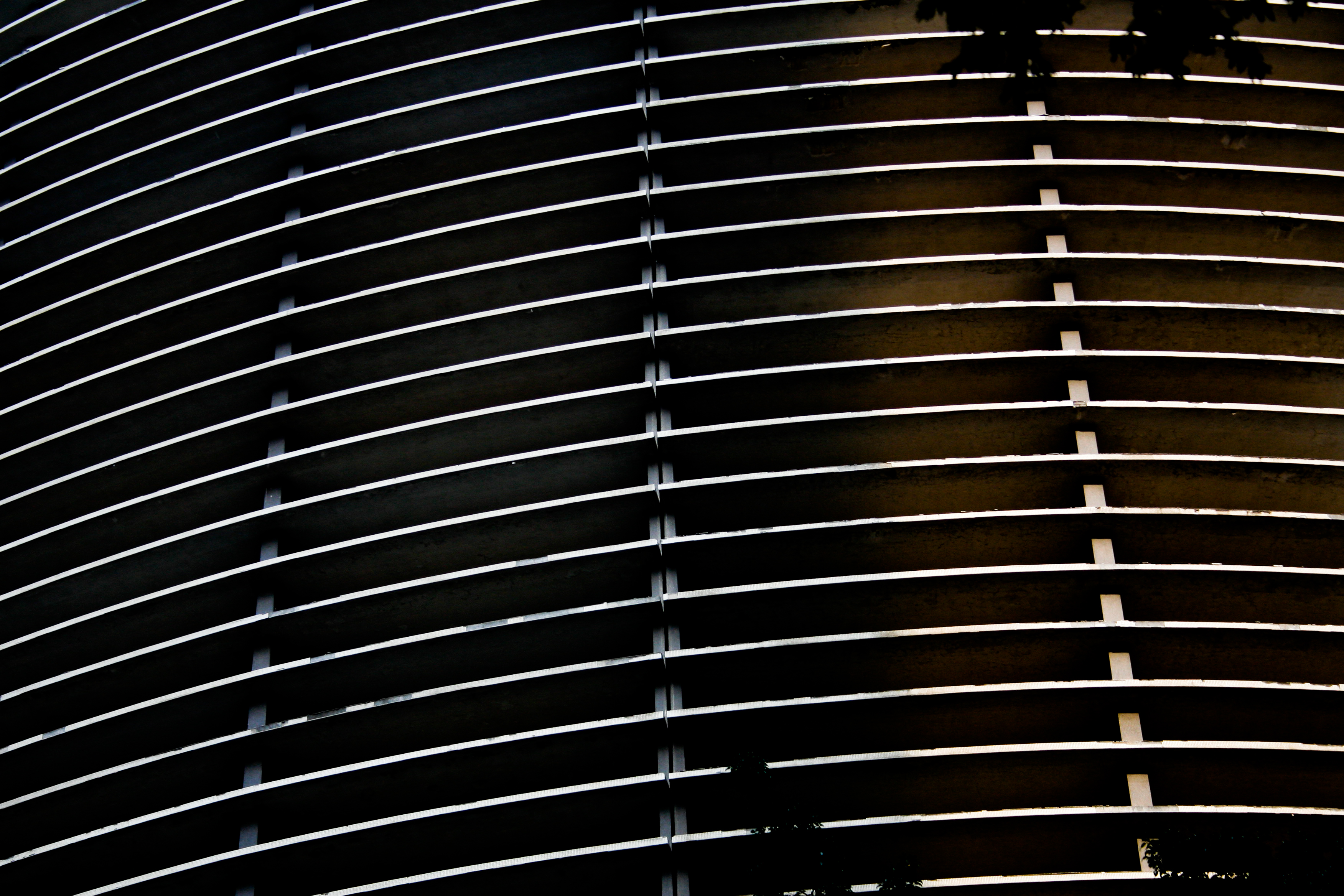 Avenida Ipiranga, 200, Bela Vista. Foto por André Deak para o Arte Fora do Museu (